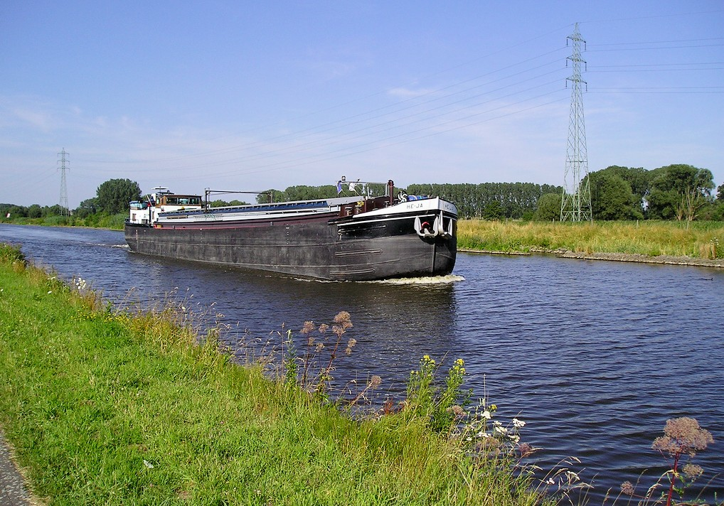 The Dender between Dendermonde and Aalst